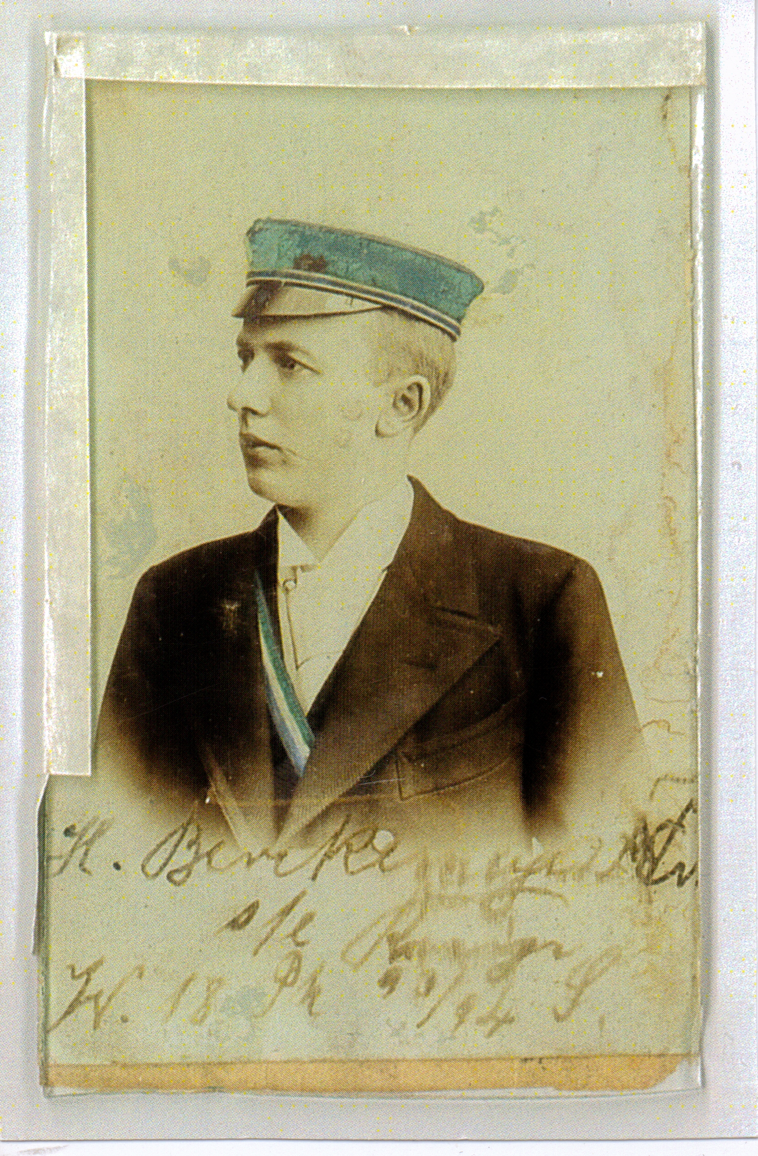 Fotografie von Hans Berckemeyer